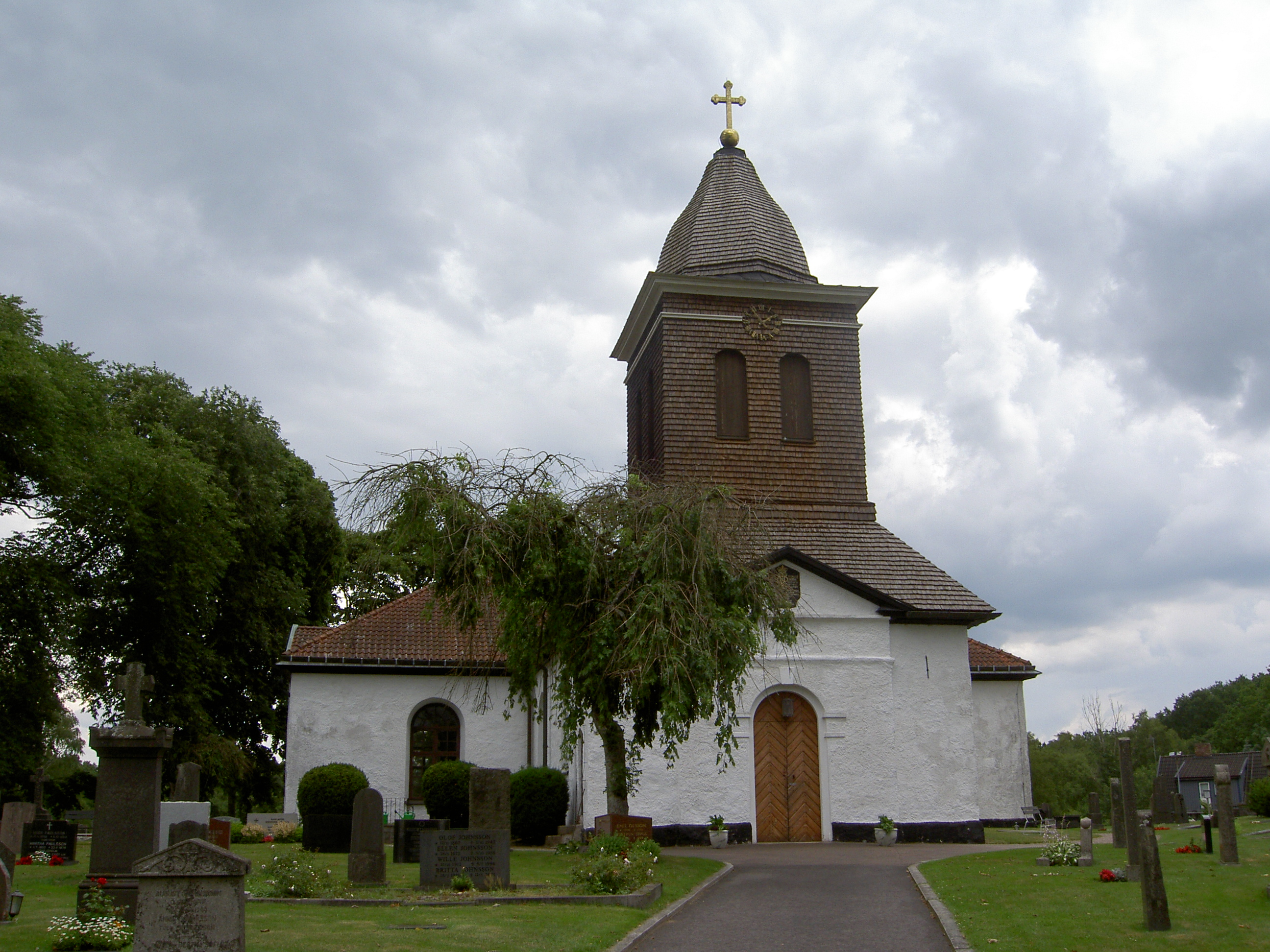 Örkelljunga kyrka